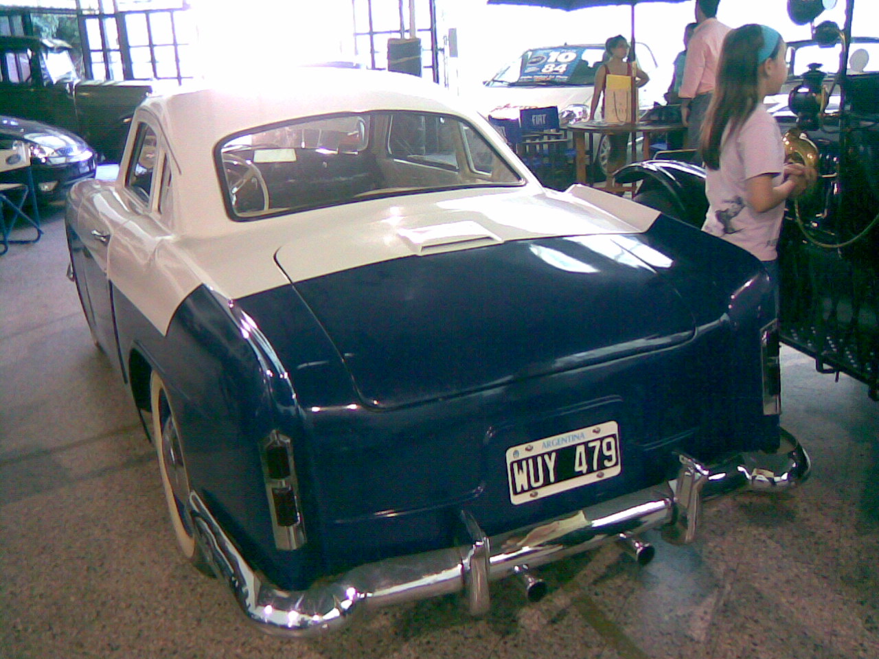 Auto justicialista 04 - vista posterior